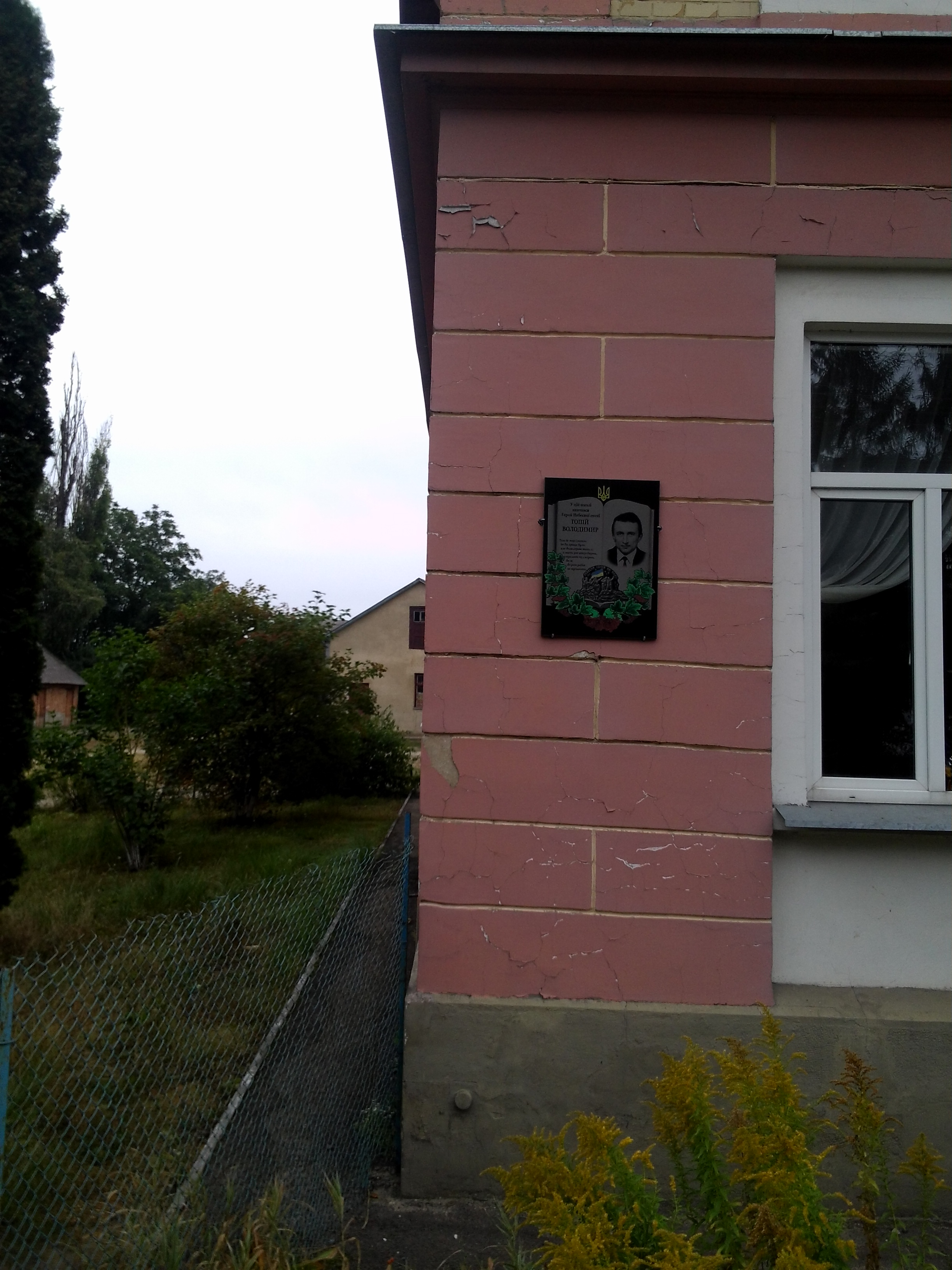 Меморіальна дошка Володимиру Топію на будівлі школи в Судовій Вишні